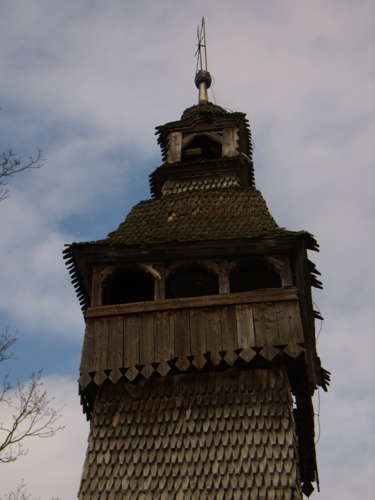 Миколаївська церква (дер.), Колодне